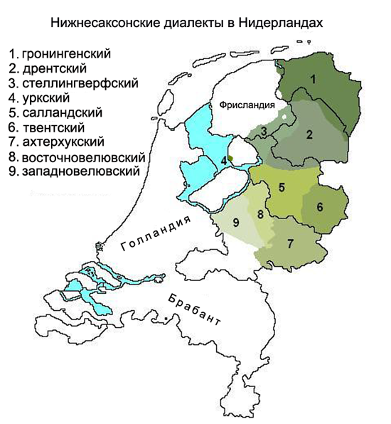 Карта распространения нижнесаксонских диалектов в Нидерландах